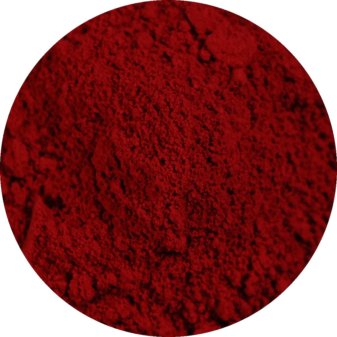 Кармін